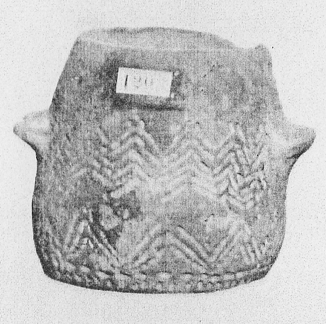 Gefäß aus dem Großsteingrab Osterode am Fallstein, heute im Landesmuseum Braunschweig